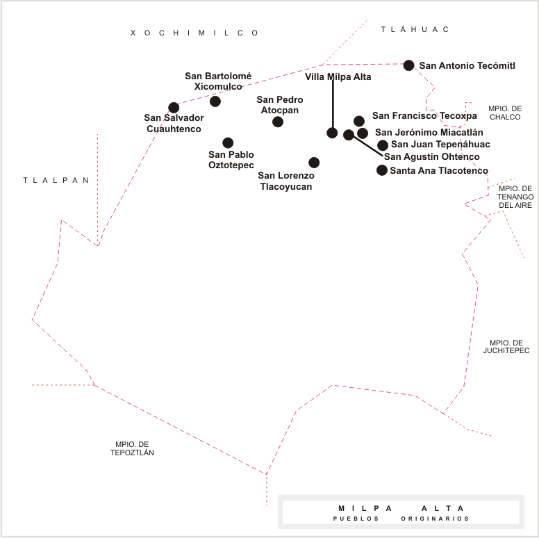 Mapa de los pueblos originarios de Milpa Alta, DF, México